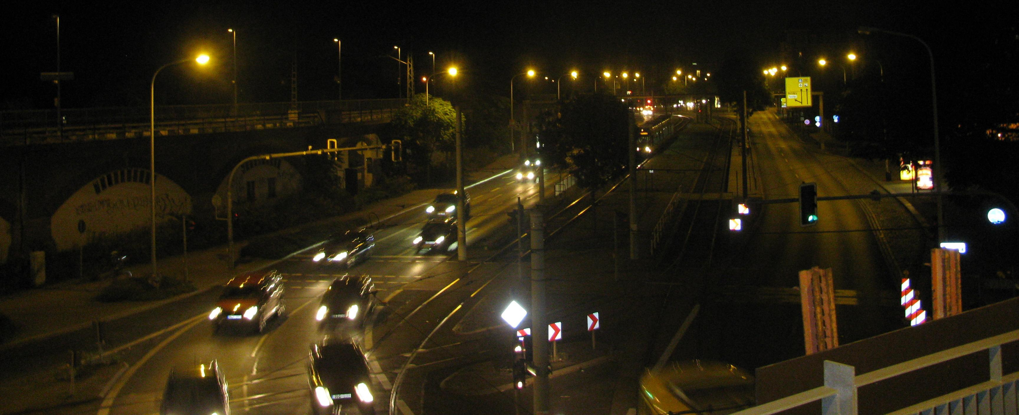 Hansastraße Dresden im Abschnitt zwischen Eisenbahnstraße und Großenhainer Straße bei Nacht, vom Bahnhof Dresden-Neustadt aus gesehen